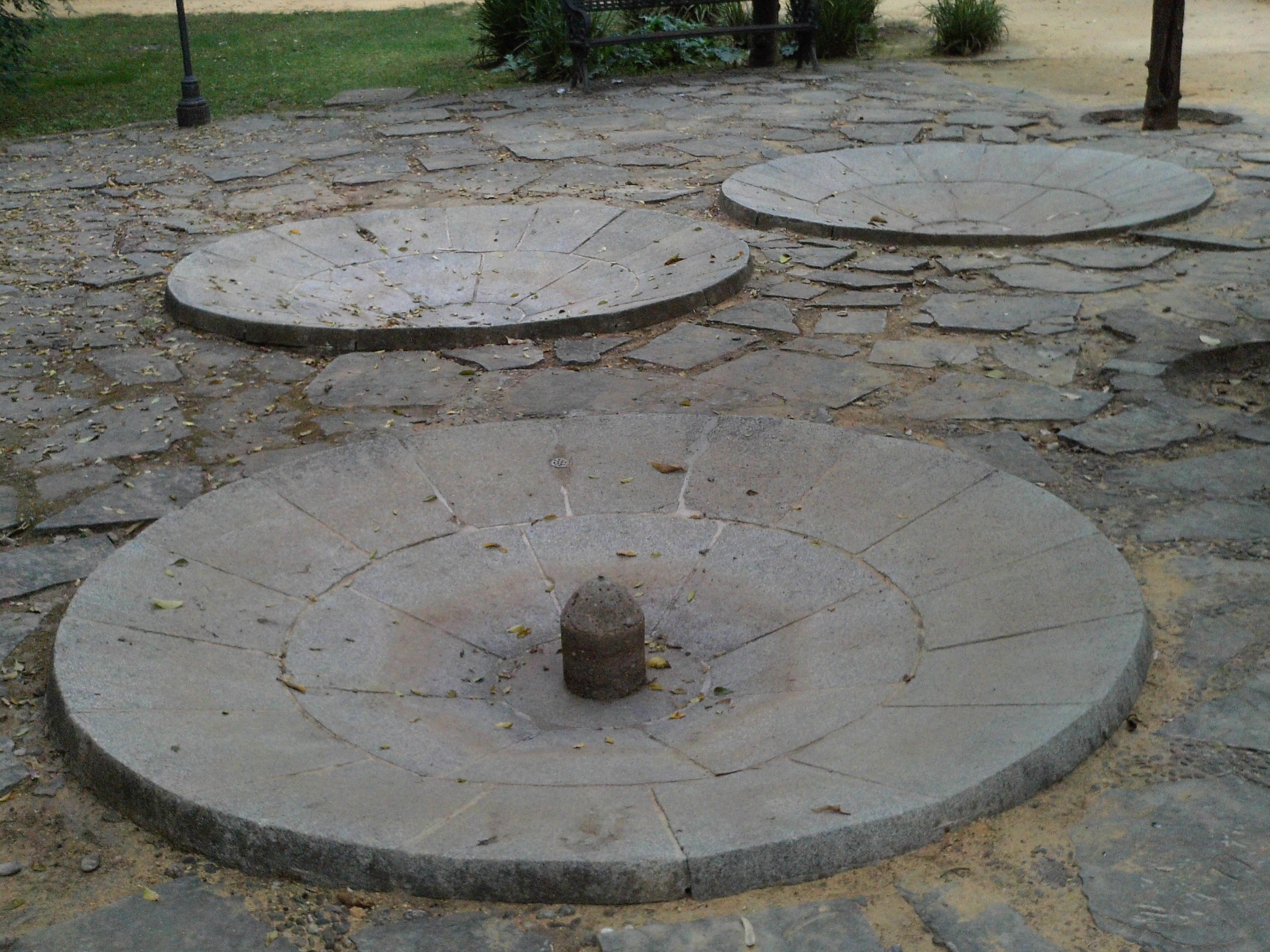 Pequeñas fuentes en la glorieta de Concha Piquer. Sevilla, Andalucía, España.